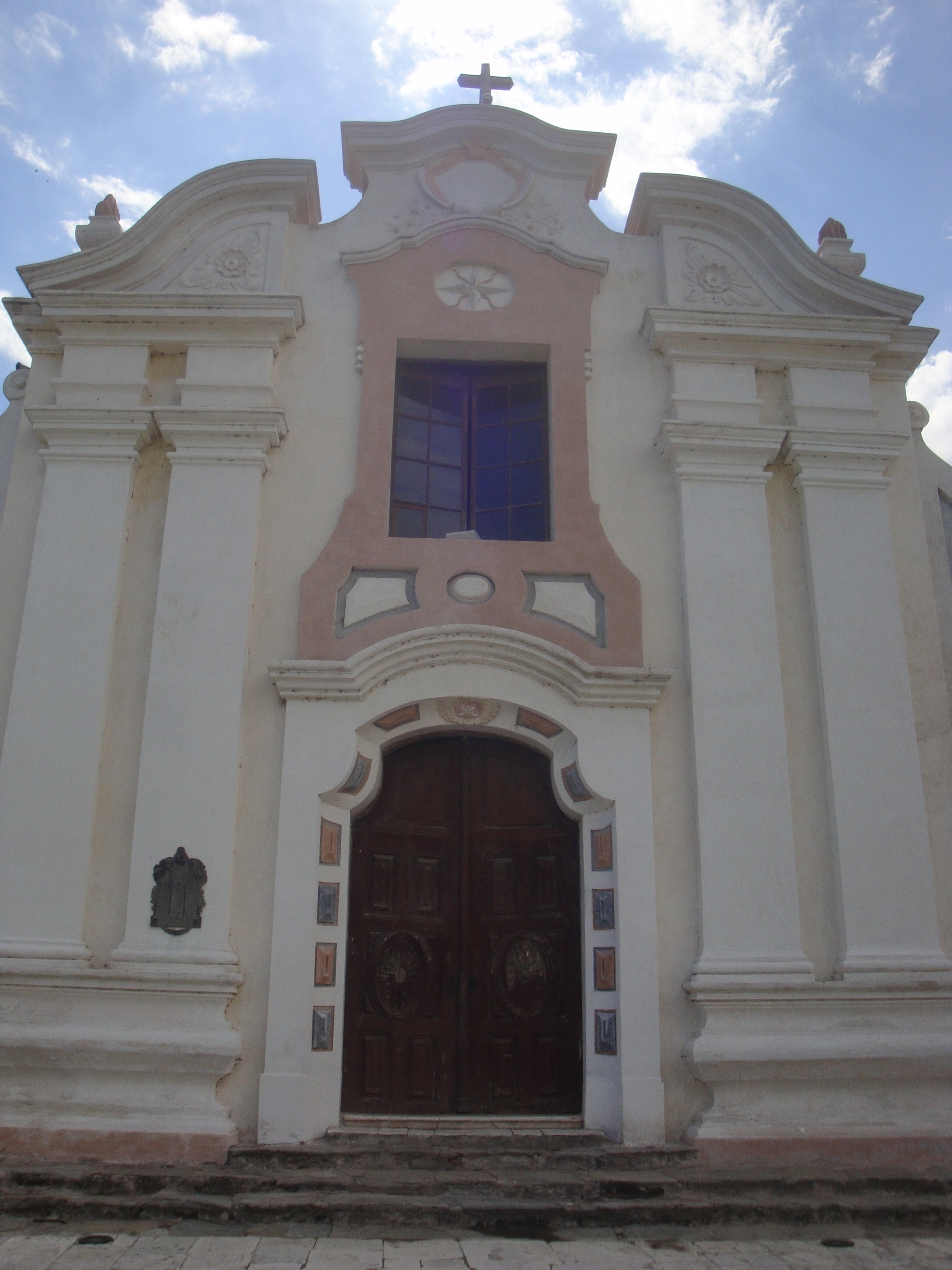 Reducción de Alta Gracia